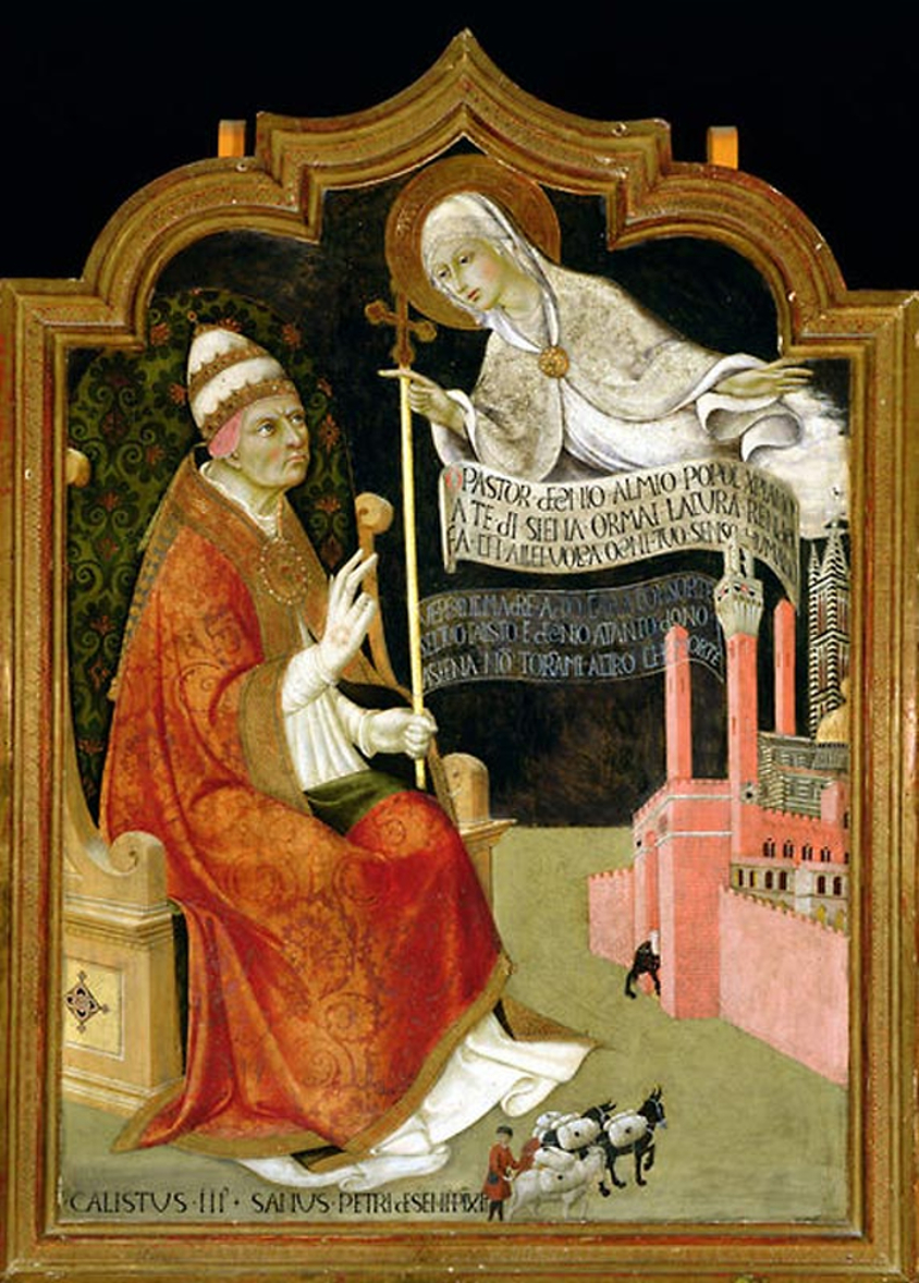 La vergine raccomanda siena a papa callisto III